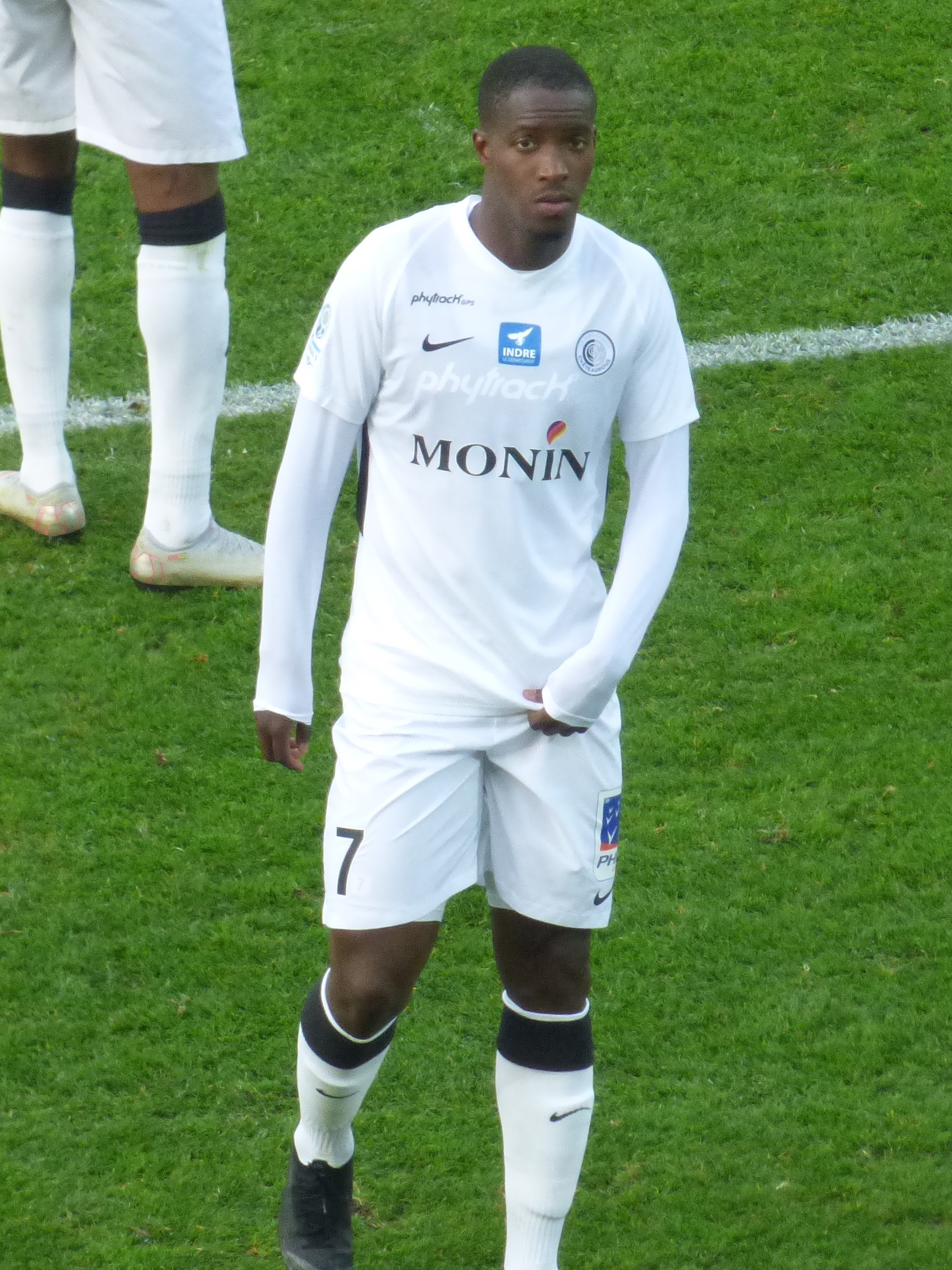 Oumare Tounkara lors du match RC Lens / LB Châteauroux, le 3 novembre 2018, comportant pour la treizième journée du championnat de France de football de Ligue 2, au Stade Bollaert-Delelis.